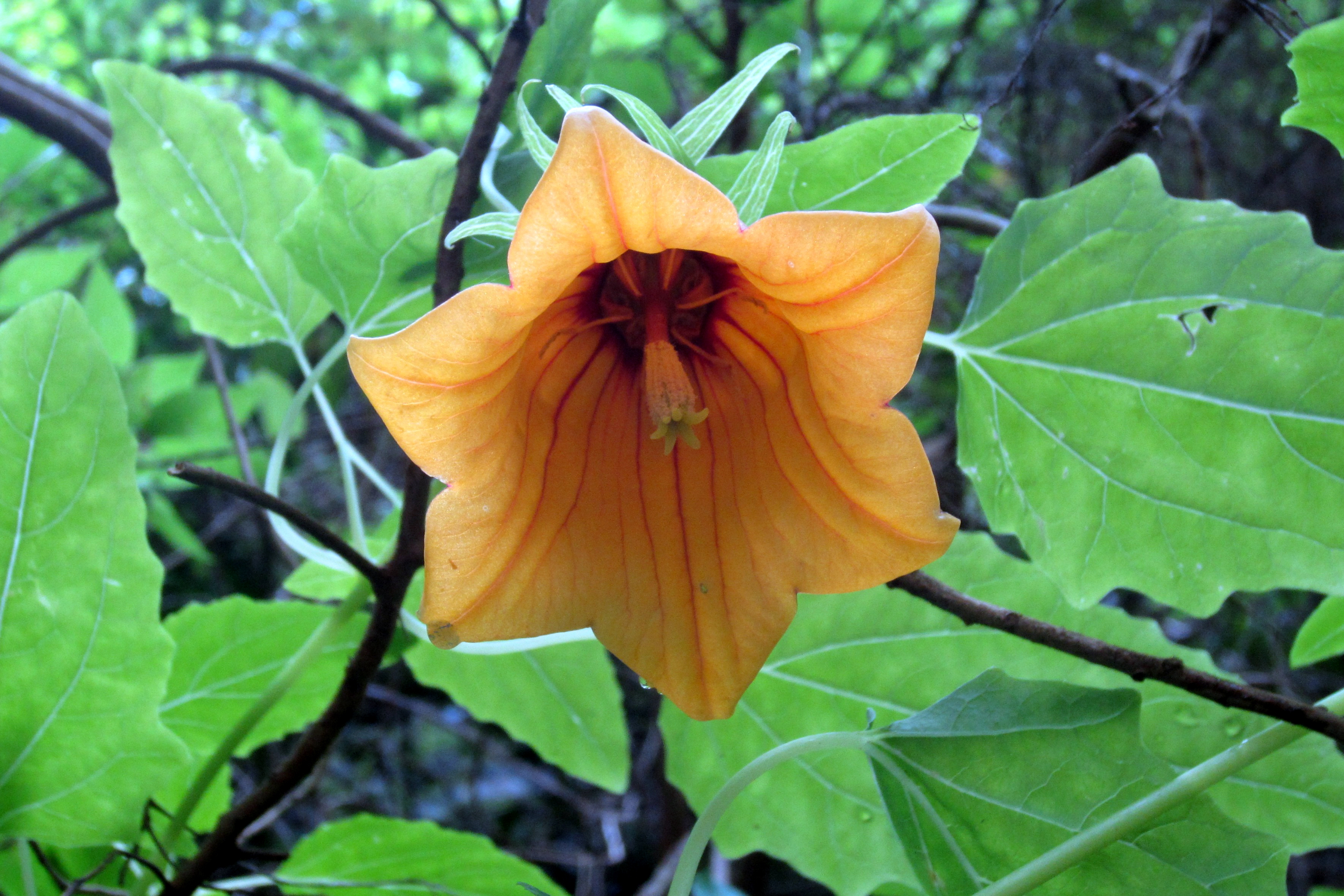 Kanaren-Glockenblume (Canarina canariensis), fotografiert auf La Palma